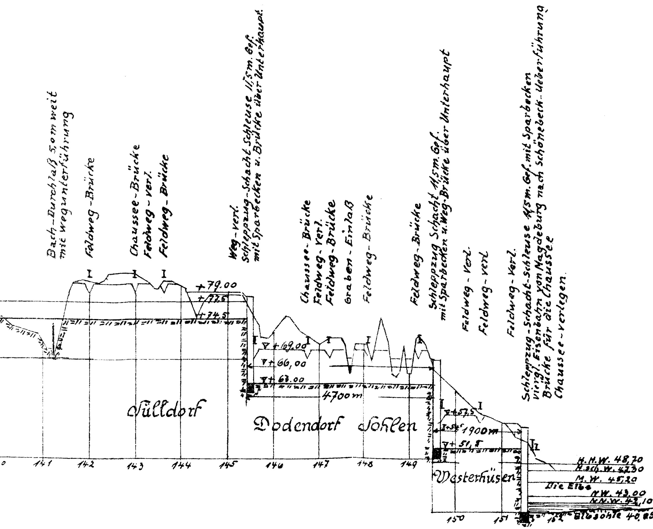 Längenschnitt des östlichen Abschnitts der (nicht verwirklichten) Südvariante des Mittellandkanals, Teilstück Sülldorf-Westerhüsen